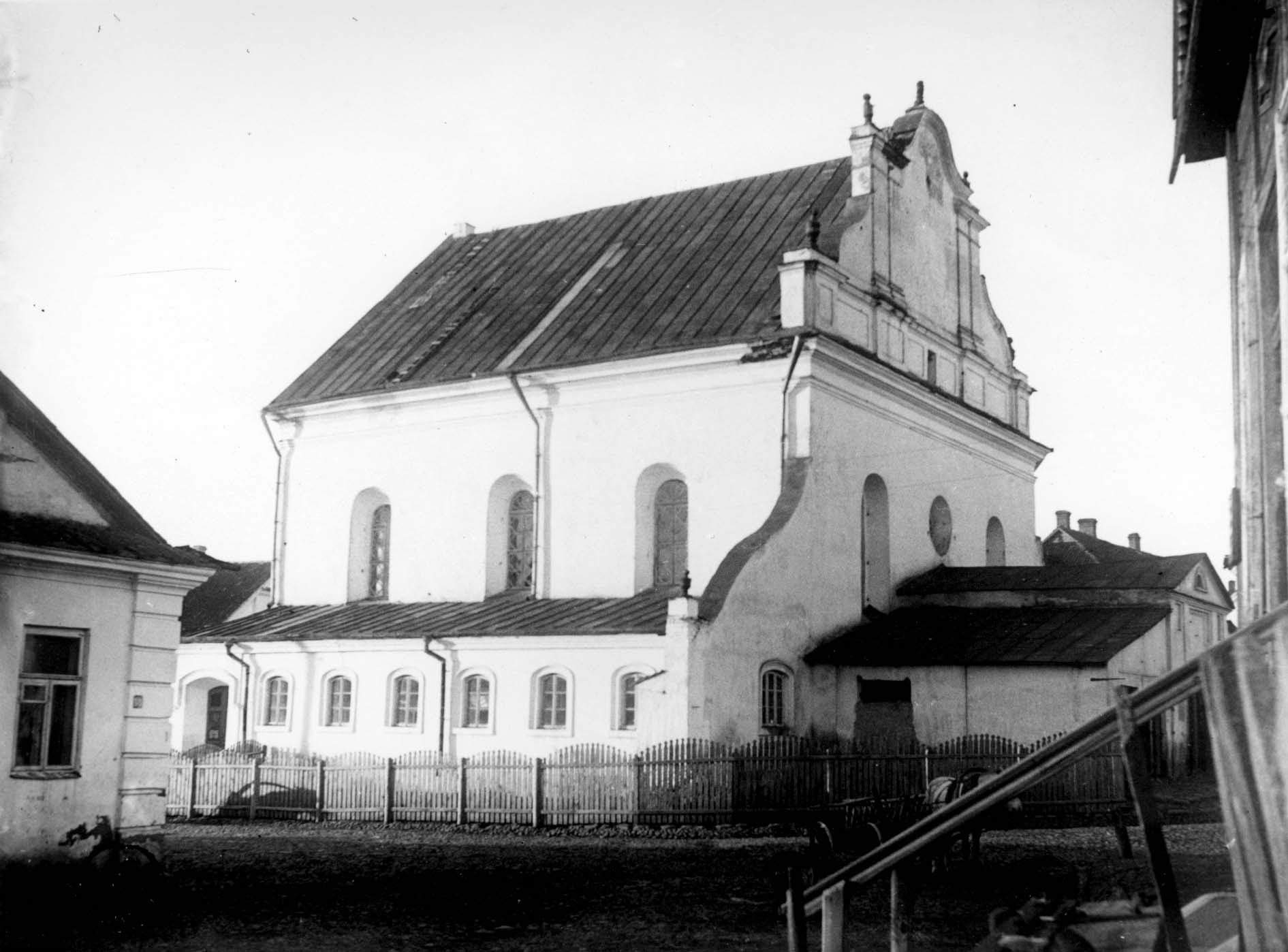 Беларуская (тарашкевіца): Слонім (Słonim), Школьны Двор (Školny Dvor). Вялікая Сынагога